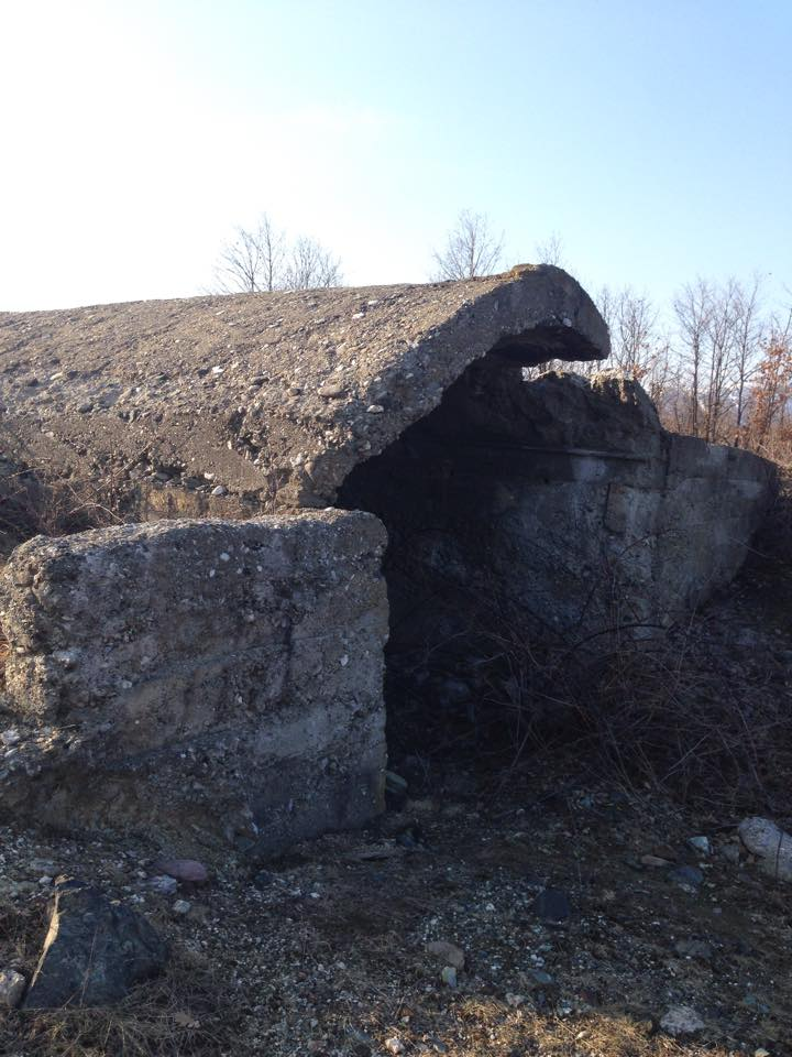 bunkier 2